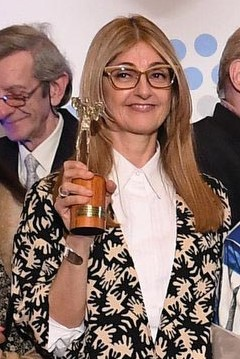 Senado de la Nación - El *Premio Podestá 2017 a la Trayectoria Honorable*: Pompeyo Audivert, Betiana Blim, Cutuli, Boy Olmi, Mauricio Kartun, Carola Reyna, Claudio Rissi, Roberto Tripolio, Jorge Villegas y Mirta Wons.*